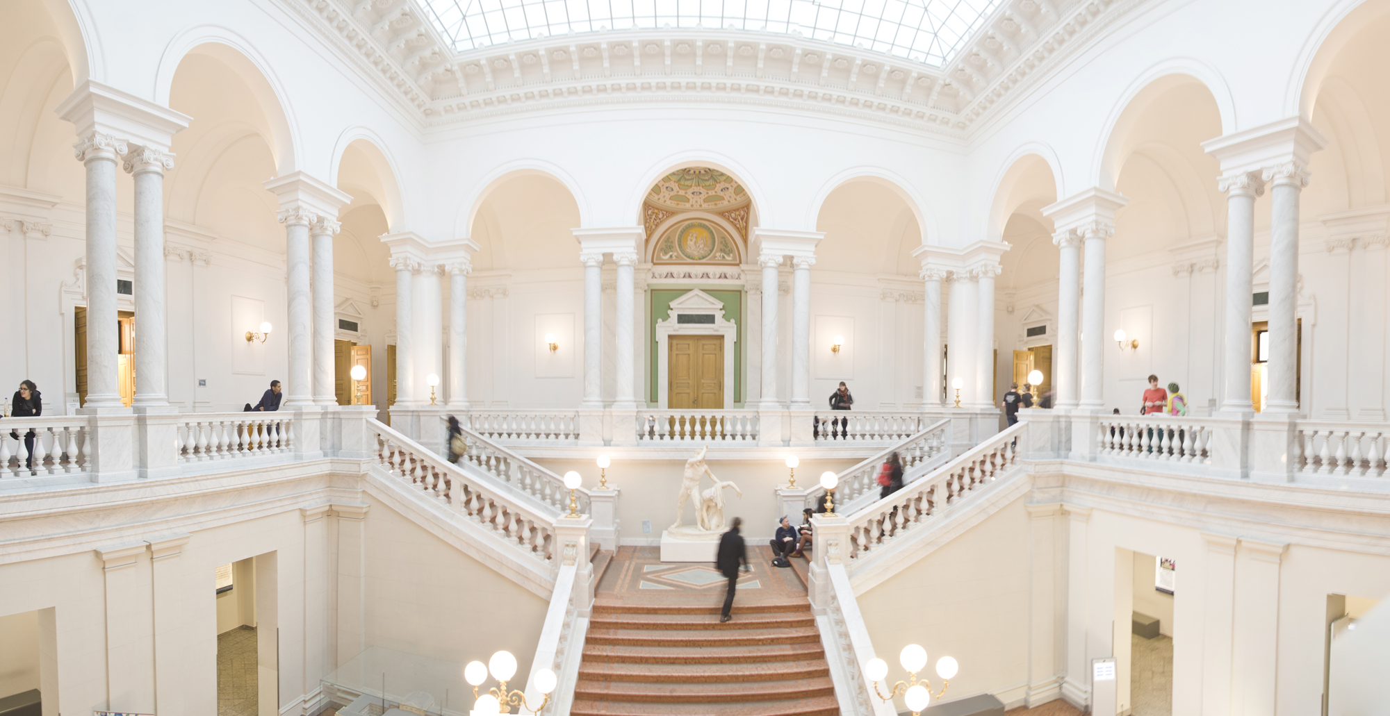 Universitätsbibliothek Leipzig, Bibliotheca Albertina, Eingangshalle